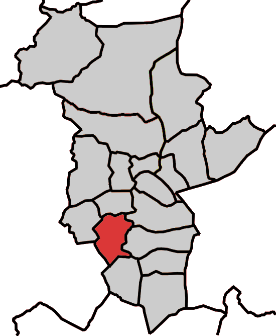 Situación da parroquia de Baroncelle no concello de Abadín